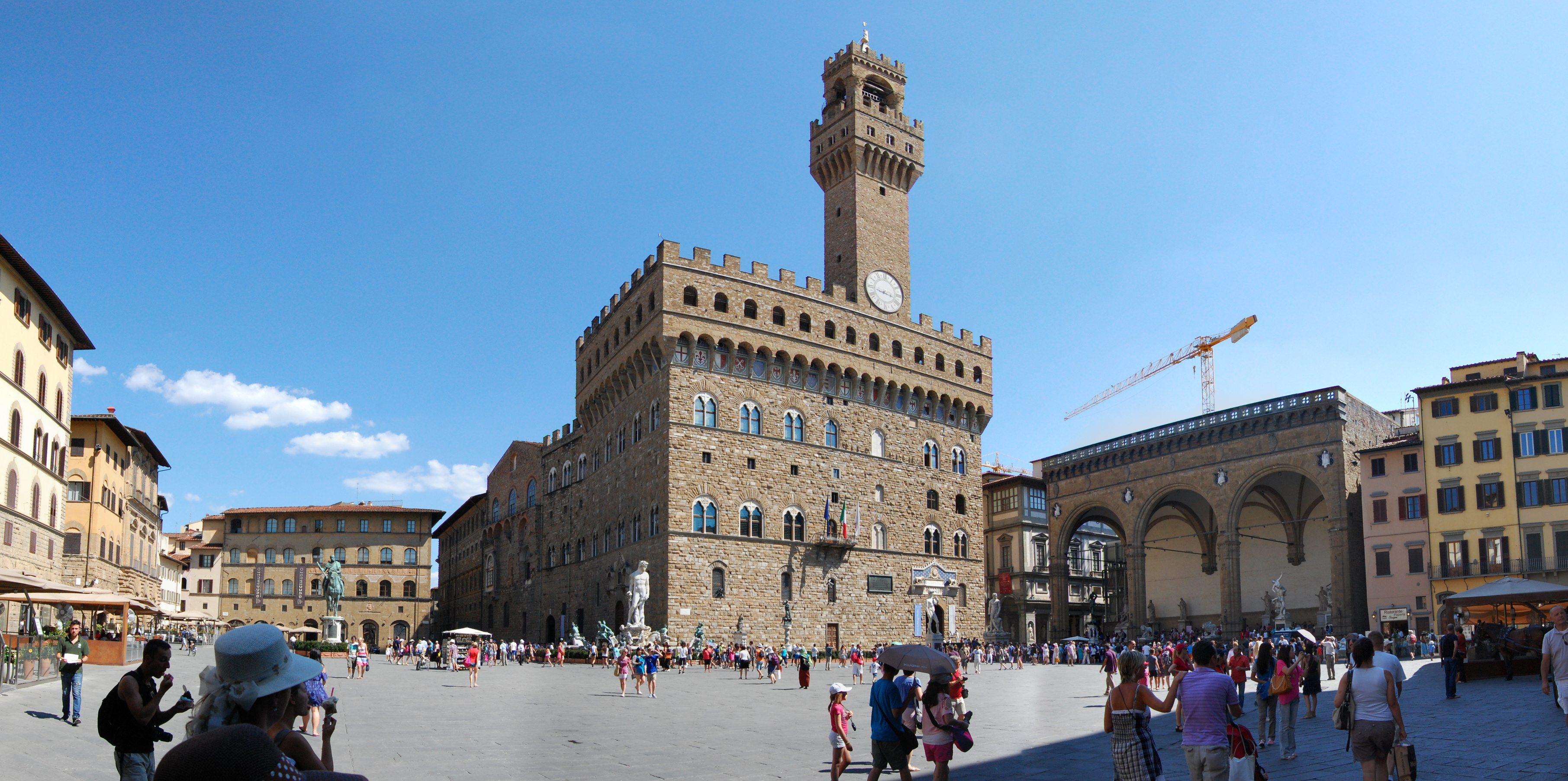 vista panoramica Piazza Signoria - Firenze